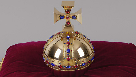 Detalle del orbe real.